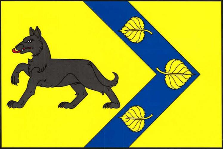 vlajka, Vlkov , okres Náchod